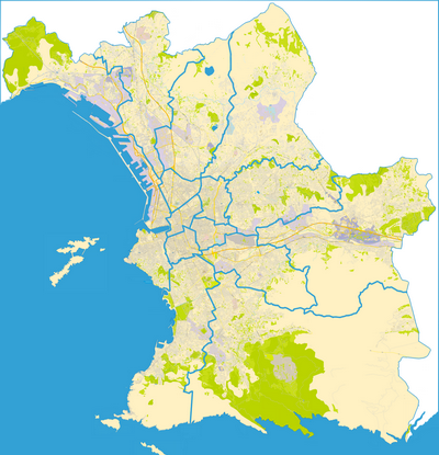 Carte de Marseille en couleur avec frontières d'arrondissements.